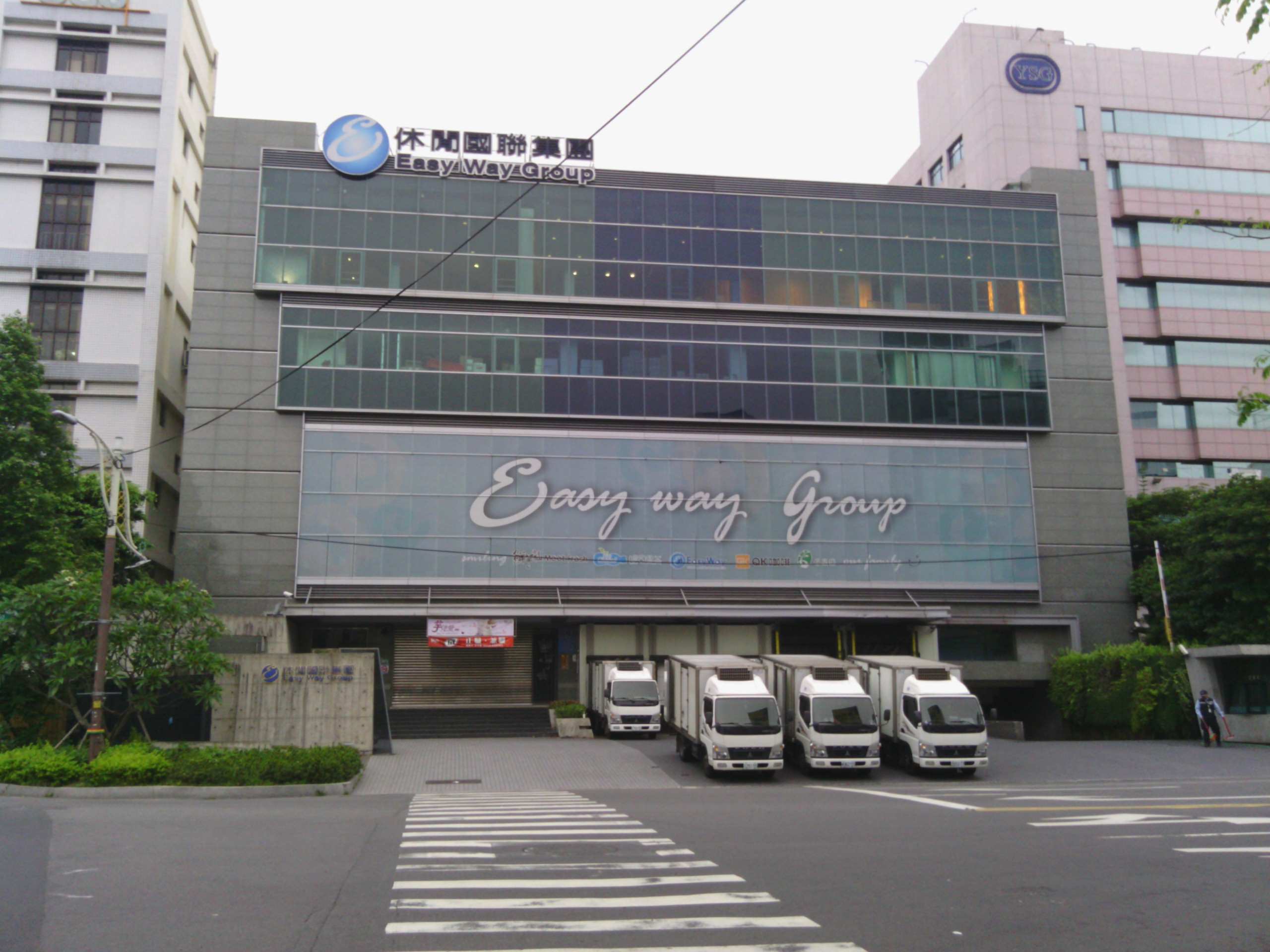 休閒國聯全球總部，地址：新北市五股區五權路39號（新北產業園區）。